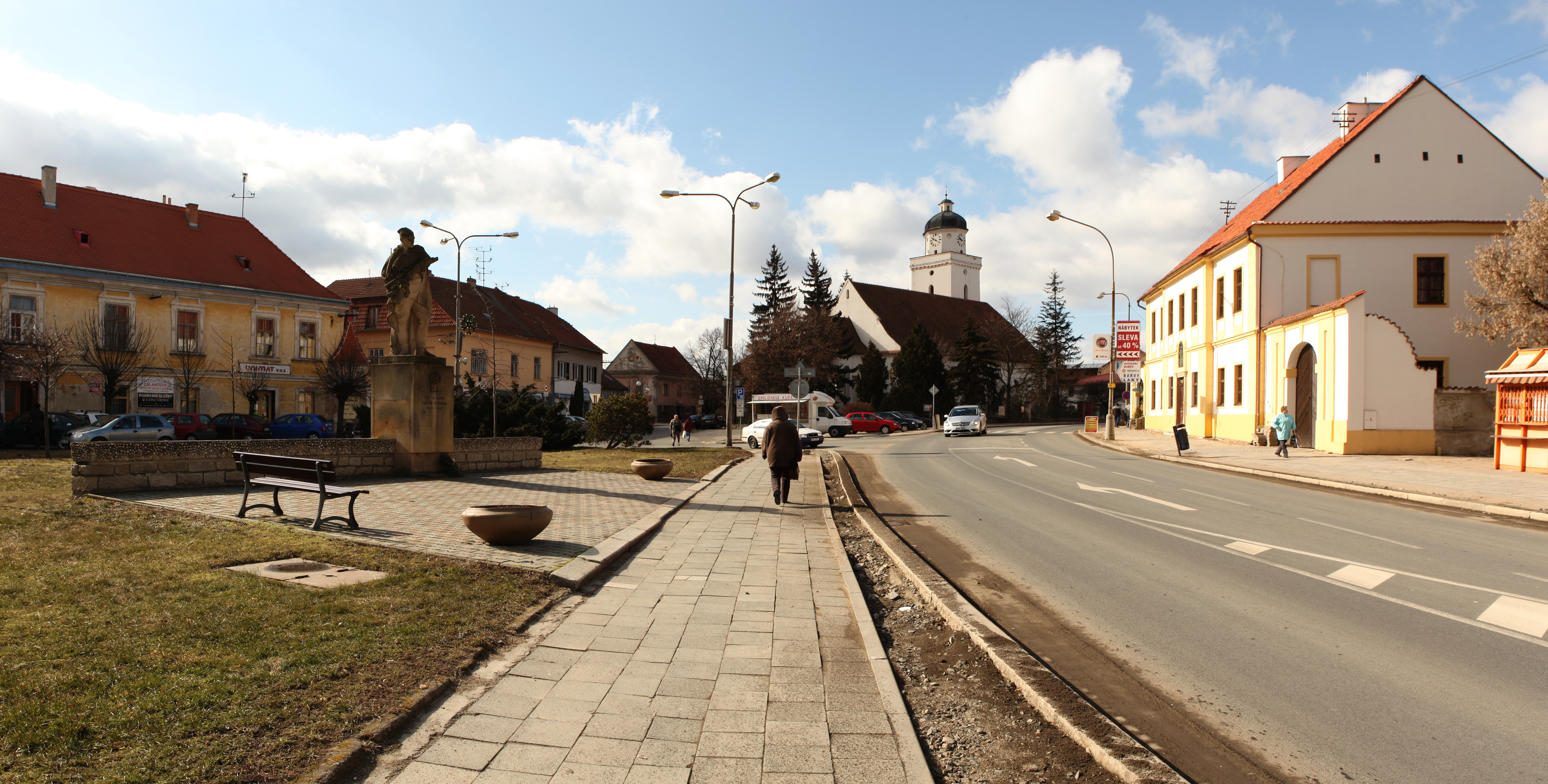 Náměstí Svobody v Pohořelicích